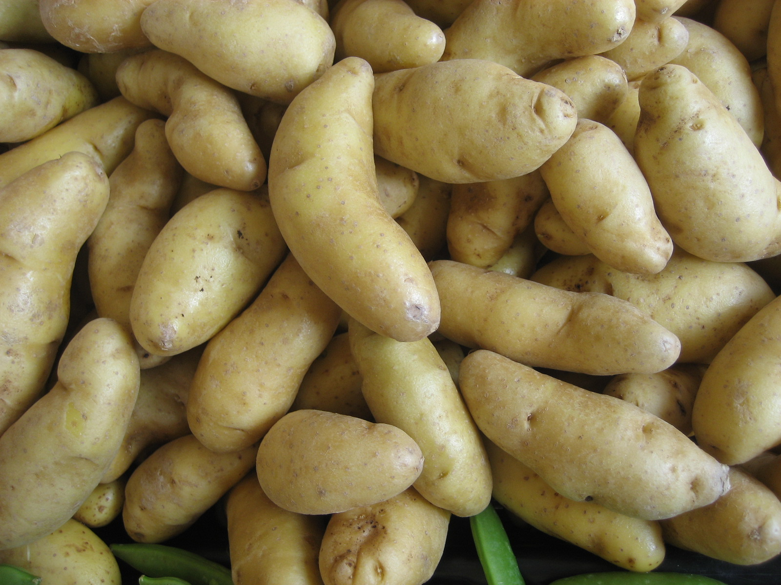 Fingerling potatoes (Russian Banana)